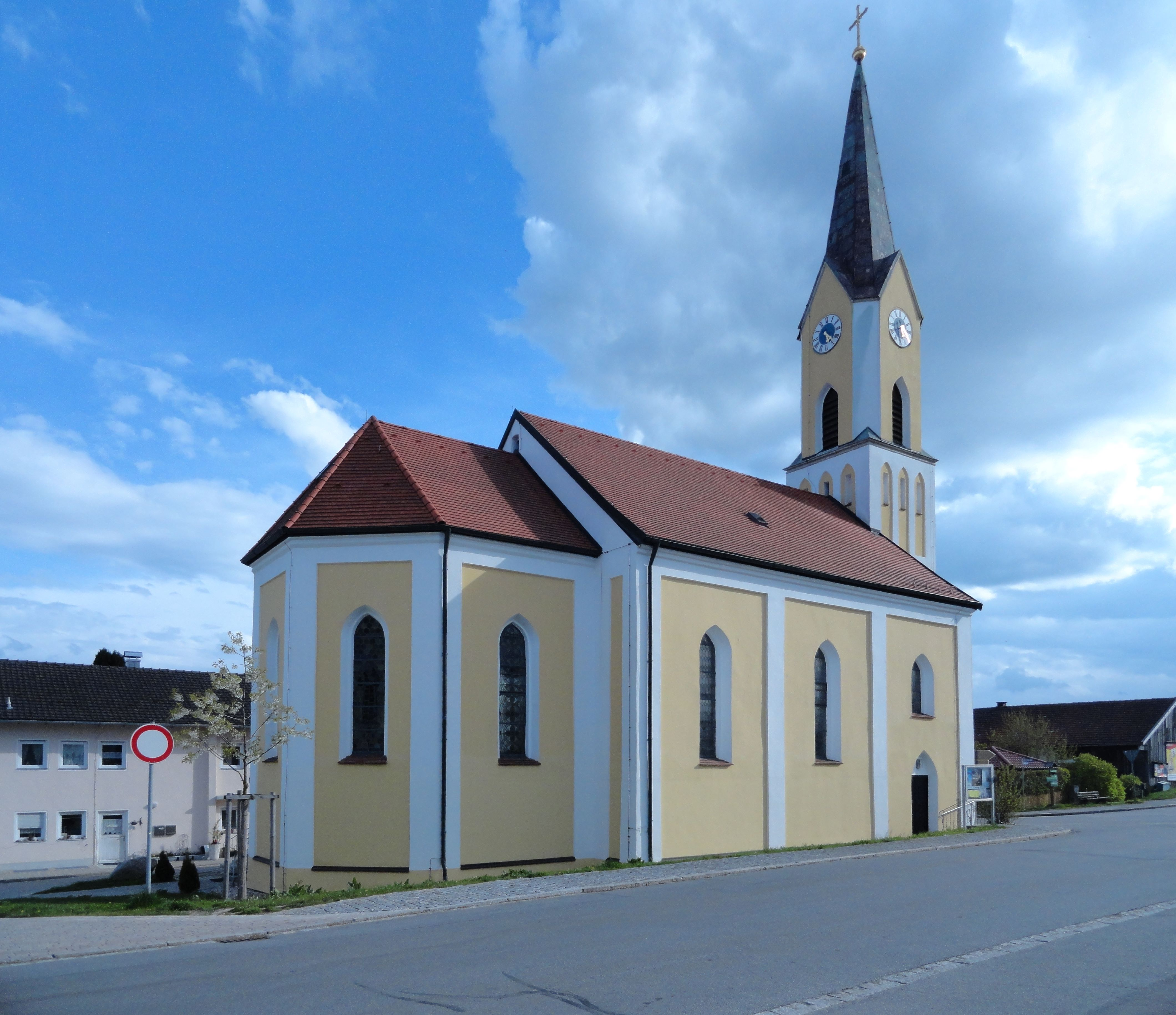 Filialkirche St. Michael Zinzenzell; Baudenkmal D-2-78-197-46